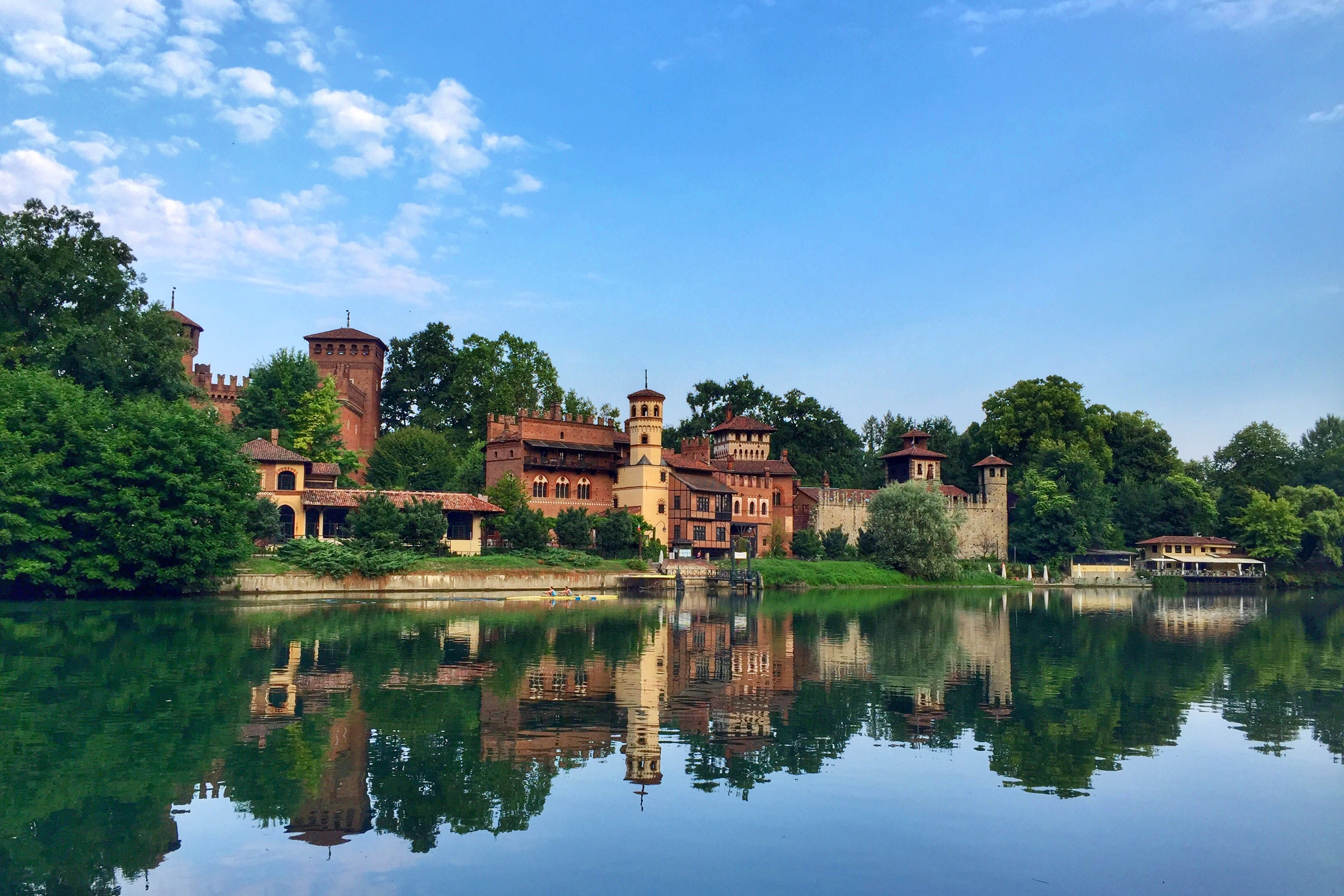 Borgo medioevale di Torino This is a photo of a monument which is part of cultural heritage of Italy.